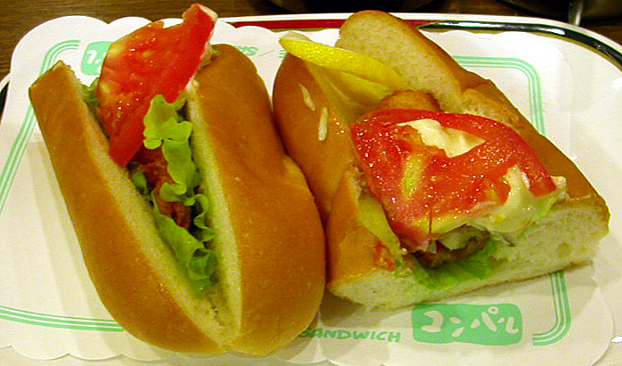 撮影者:小太刀 金シャチドッグ。ソーセージの代わりにエビフライが入っているホットドッグです。